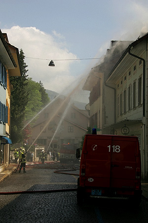 Feuerwehreinsatz in Moutier (Brand eines Mehrfamilienhauses)